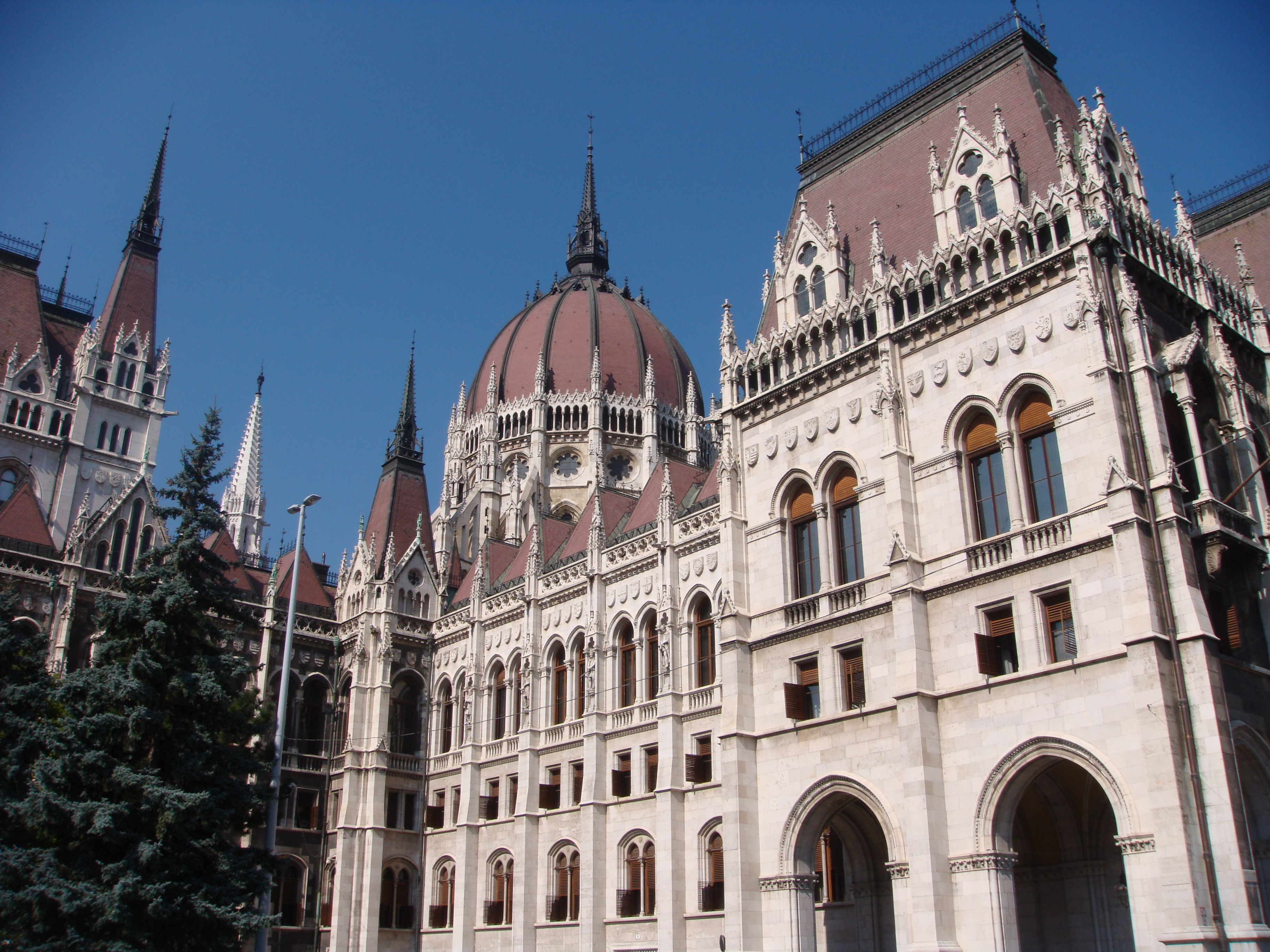 неоготика 19 век